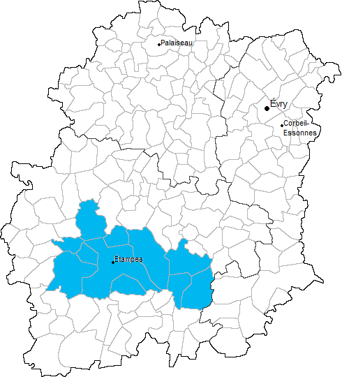 Carte de localisation du canton d'Étampes en Essonne (91)